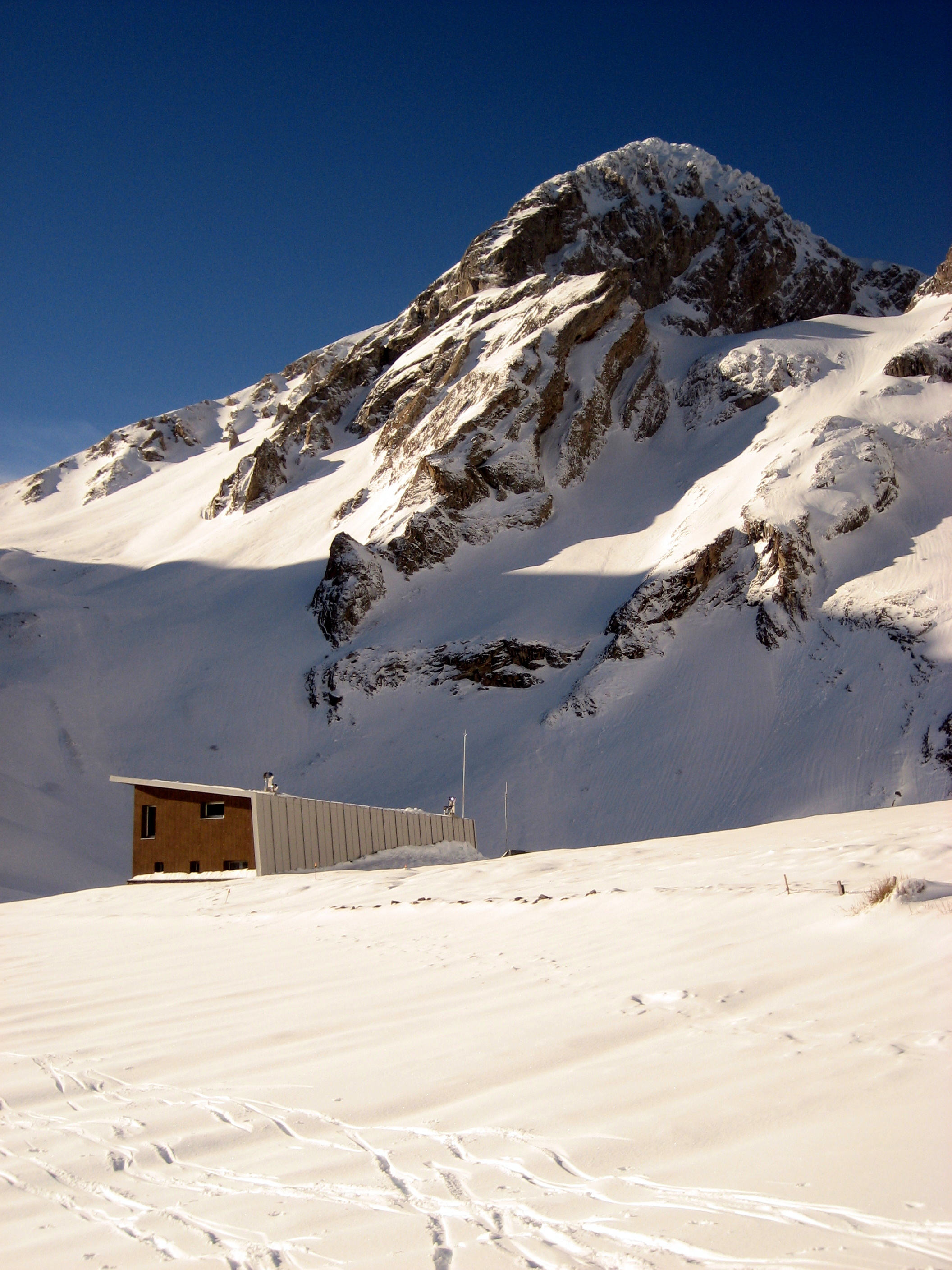 refugio de El Meicín a los piés del pico Peña Ubiña